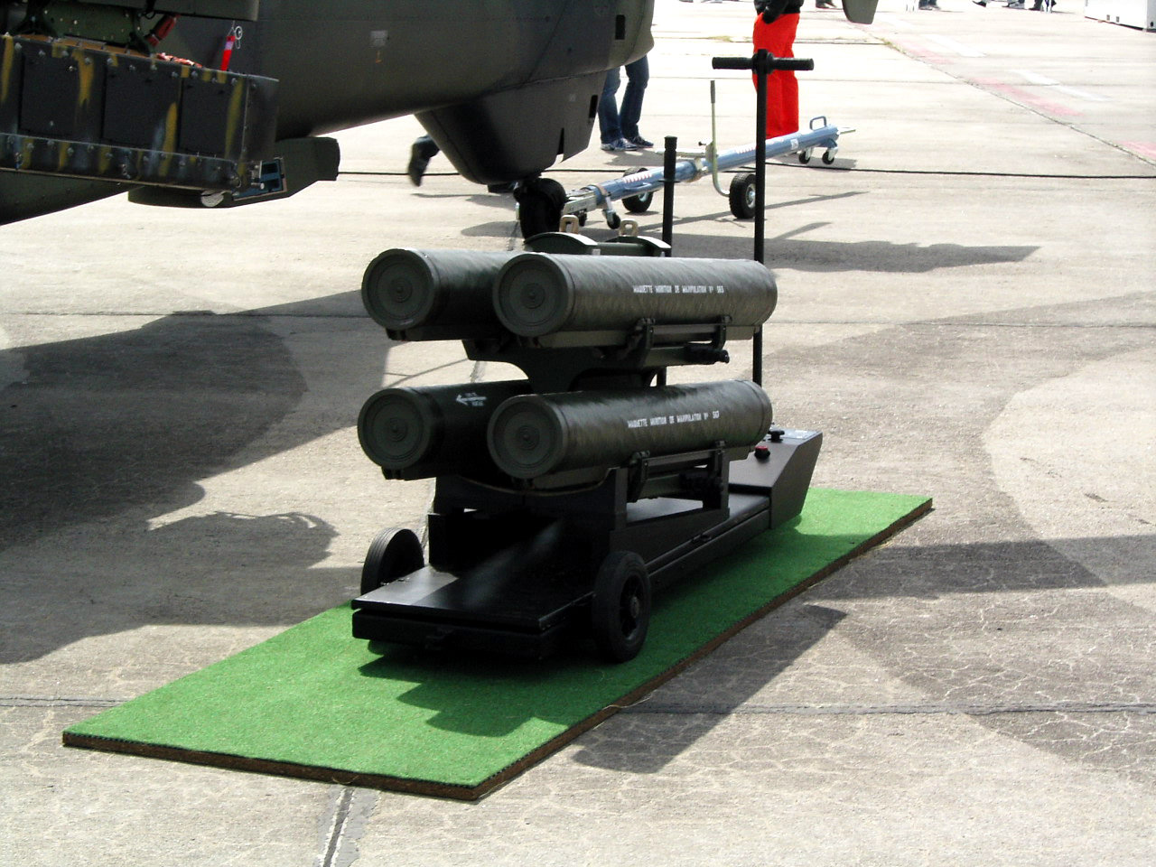 Abschussbehälter für HOT3 Flugkörper